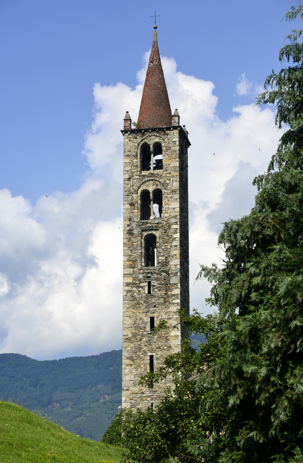 Chiesa di Sant'Antonio Abata a Sala Capriasca